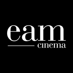 Logo de El antepenúltimo mohicano